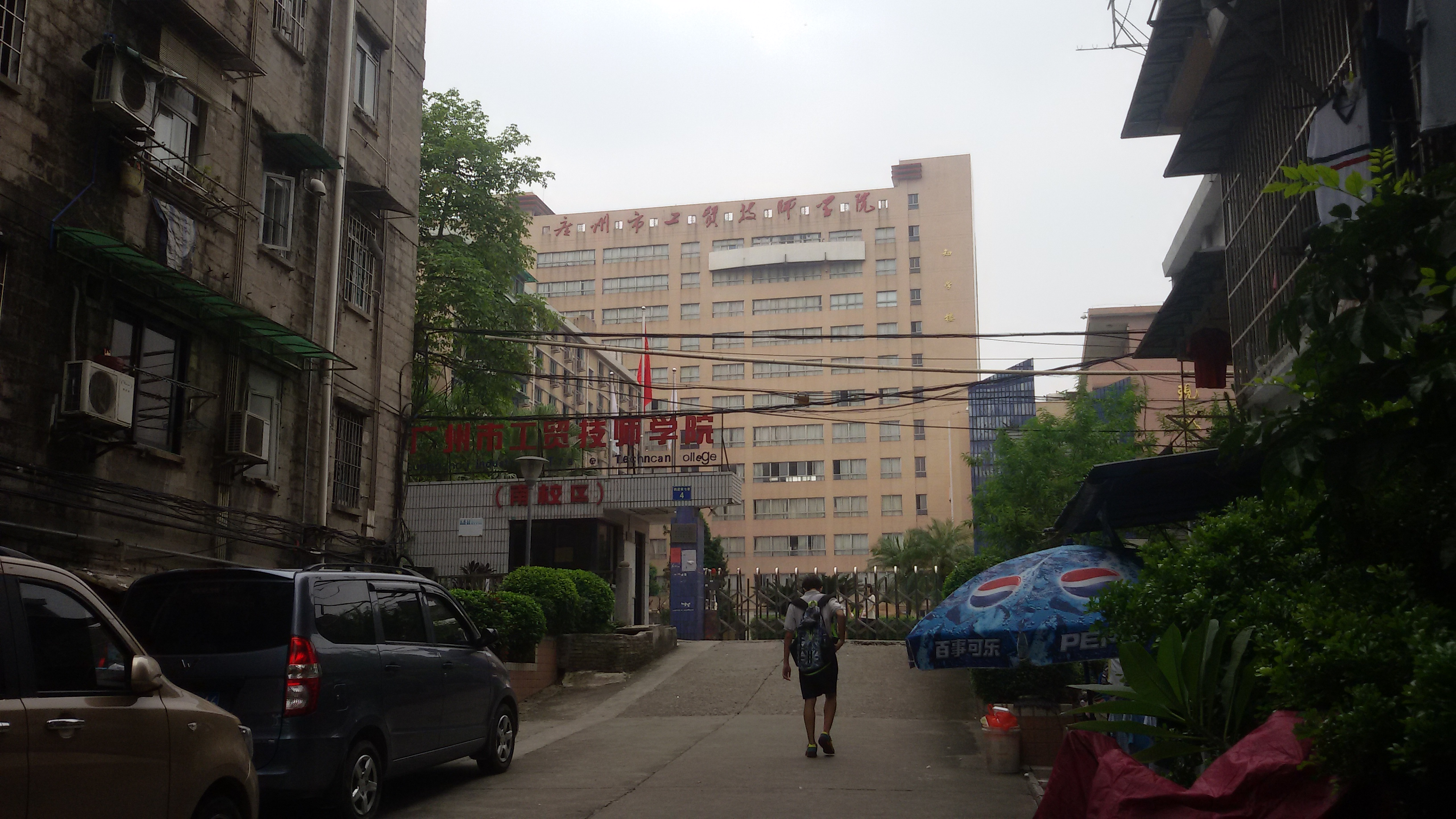 粵語: 廣州市冶金高級技工學校（白鶴洞校區）正門